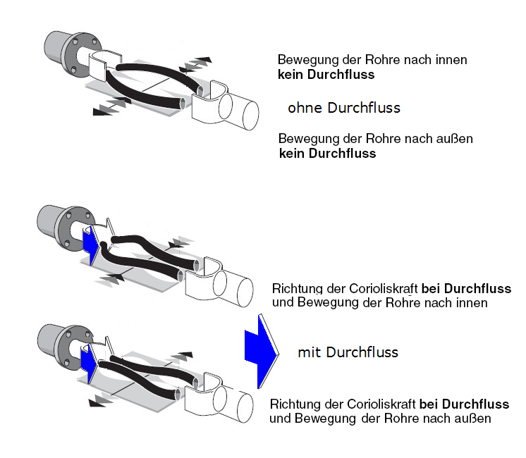 Coriolis Zwei-Rohrversion Funktion